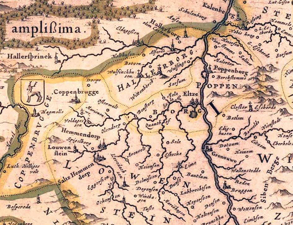 Dieser Ausschnitt einer Karte von Willem und Joan Blaeu zeigt das nördliche Leinebergland im Jahr 1645. Durch Umrundungen sind Gerichtsbezirke gekennzeichnet. Der Gerichtsbezirk "Hallerborg" (Hallerburg) umfasste in den Jahren 1610 bis 1852 die "Adenser Gohe". Zuvor lag der Gerichtsbezirk "Adensen" in den Jahren 1523 bis 1609 in der "Adenser Gohe". Die Burg "Hallerburg" wurde in der Hildesheimer Stiftfehde im Jahr 1519 zerstört. Nach der Zerstörung der Hallerburg gingen die Aufgaben des Gerichts und der Verwaltung der ehemaligen Herrschaft Adenoys von 1523 bis 1852 an das Amt Calenberg über. In dieser Zeit bestand die "Adenser Gohe", die die Orte Adensen (Ahnsen), Alferde, Boitzum (Bolzen), Hallerburg (Hallerborg), Holtensen (Holthusen), Sorsum, Wittenburg (Wittenborch), Wülfingen (Wulfingen) und Wülfinghausen (Wulfinckhusen) umfasste. In Adensen arbeitete von 1523 bis 1609 ein für die "Adenser Gohe" zuständiger Verwaltungs-, Urkunds- und Gerichtsbeamter, der sogenannte "Gohgräfe". Von 1610 bis 1852 war der "Gohgräfe" in Hallerburg tätig. Seit 1668 arbeitete er in dem Amtshaus in Hallerburg. 1852 wurde die "Adenser Gohe" aufgelöst. Zuständig für die Verwaltung von Adensen und Hallerburg war anschließend das Amt Calenberg und für die gerichtlichen Angelegenheiten das Amtsgericht Calenberg. 1885 wurde aus den Ämtern Calenberg und Springe der Landkreis Springe gebildet. Das Amtsgericht Calenberg wurde im Jahr 1939 mit dem Amtsgericht Elze vereinigt.